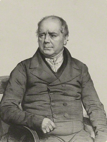 Уильям Яррел (англ. William Yarrell, 3 июня 1784 — 1 сентября 1856) — английский натуралист.